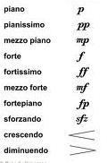 Ñabardurak